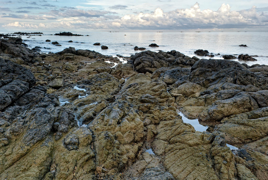 Jawili, Tangalan, Aklan, Philippines